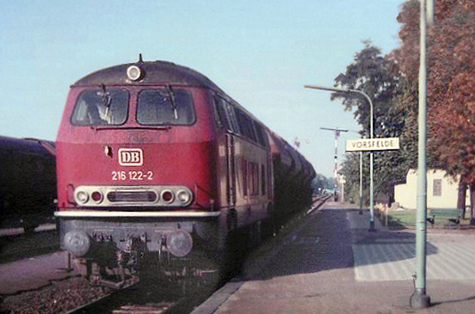 Bildbeschreibung: Lok 216 122-2 im Vorsfelder Bahnhof Quelle: 1983 selbst fotografiert von vorsfelder